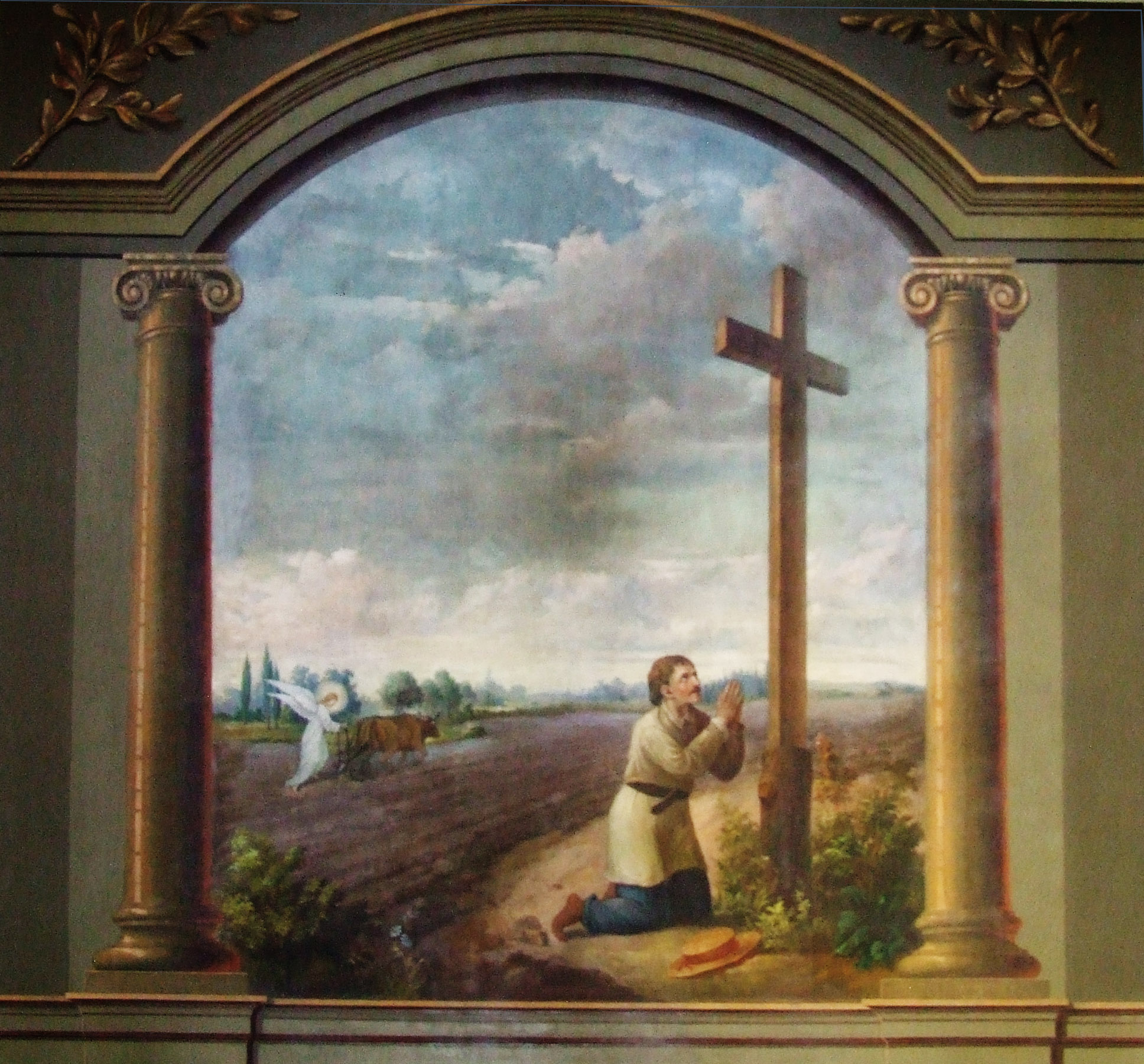 Garwolin, ul. Staszica 11 - kościół p.w. Przemienienia Pańskiego, fresk w nawie północnej przedstawiający św. Izydora, który modli się przed krzyżem, podczas gdy anioł orze pole (zabytek nr 741 z 7.05.1962)